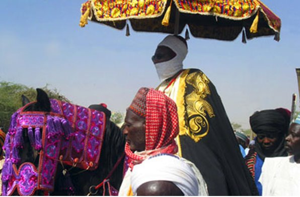 Festival Hawan Kafo Zinder